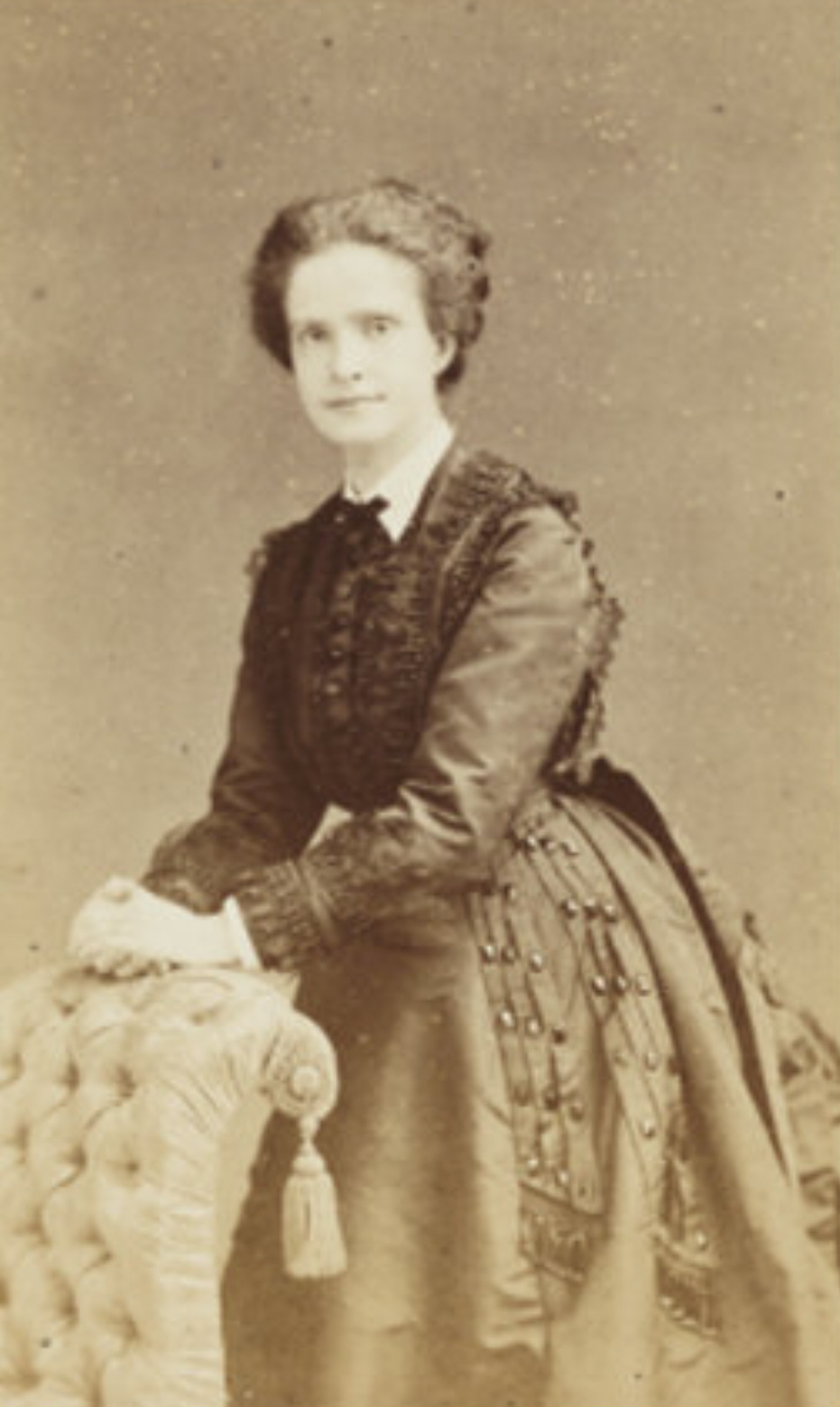 Maria Pia von Savoyen (* 16. Oktober 1847; † 5. Juli 1911), Prinzessin von Italien und Königin von Portugal.